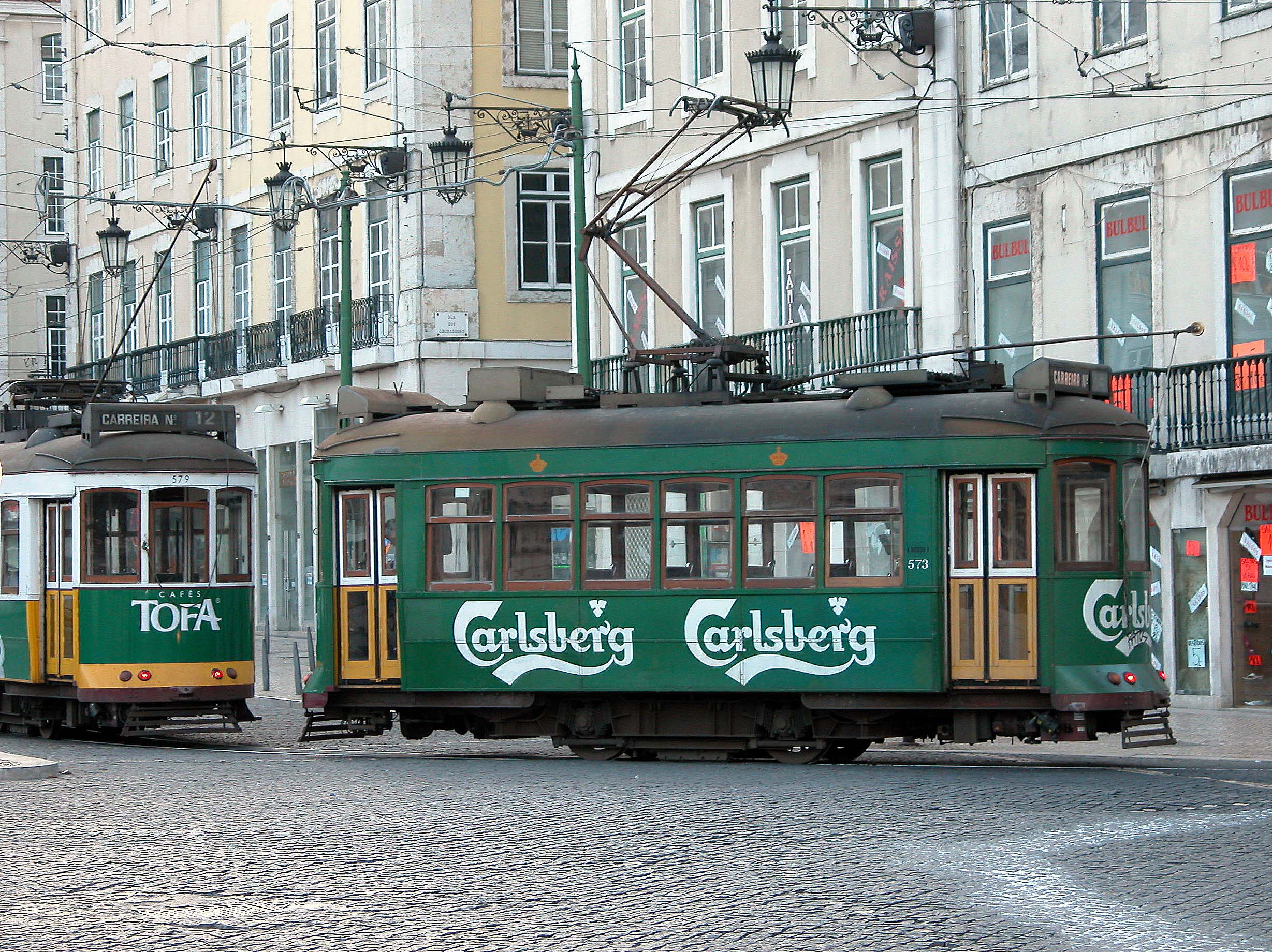 Eléctricos na Praça da Figueira, com publicidade a cafés e cerveja.